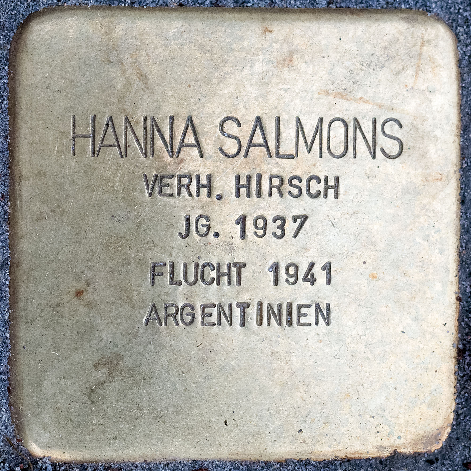 Stolpersteine Willich: Salmons, Hanna